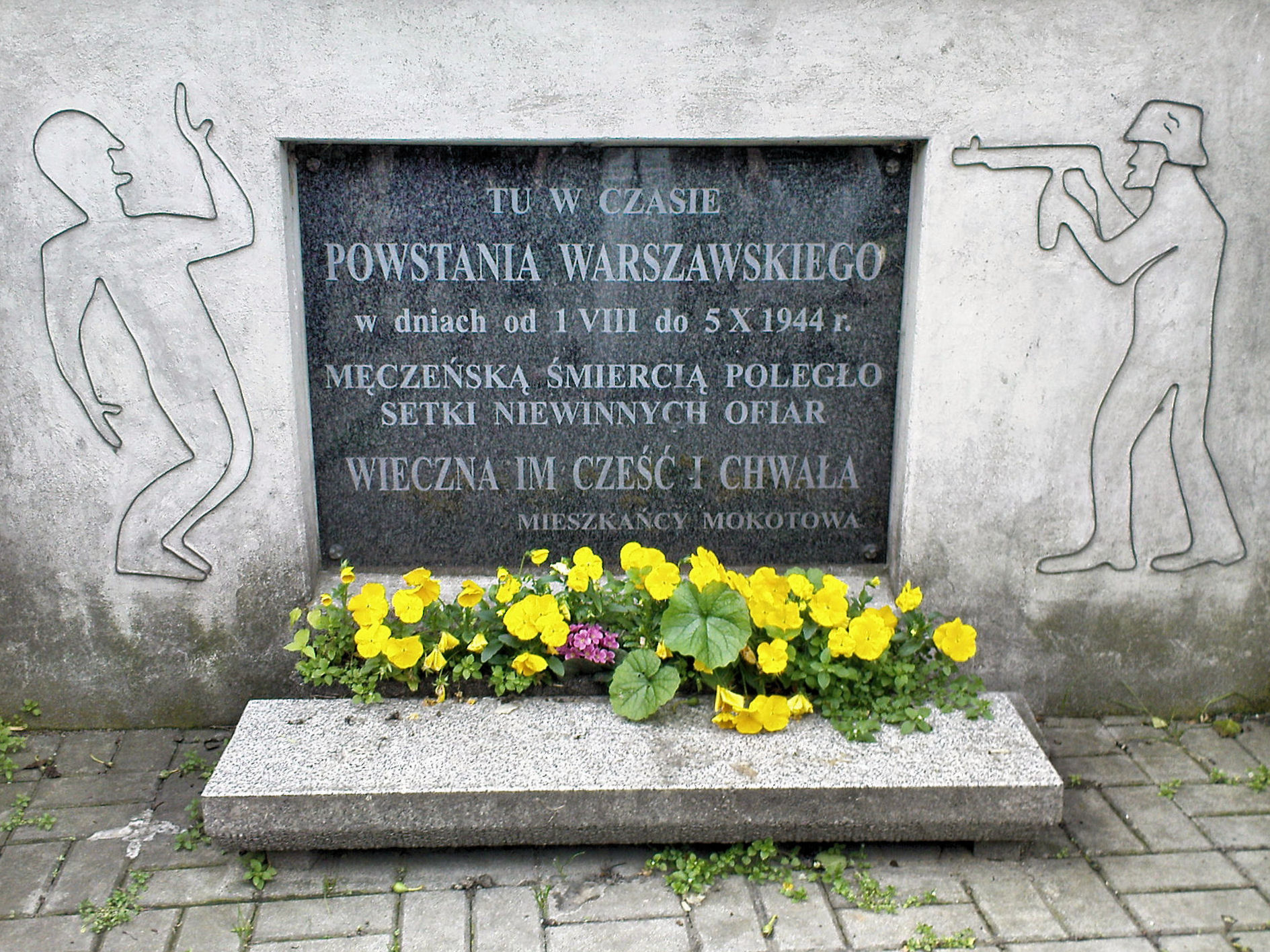 Tablica ufundowana przez mieszkańców Mokotowa informuje o setkach niewinnych ofiar, zamordowanych przez Niemców w tym rejonie podczas Powstania Warszawskiego w dniach od 1 sierpnia do 5 września 1944r